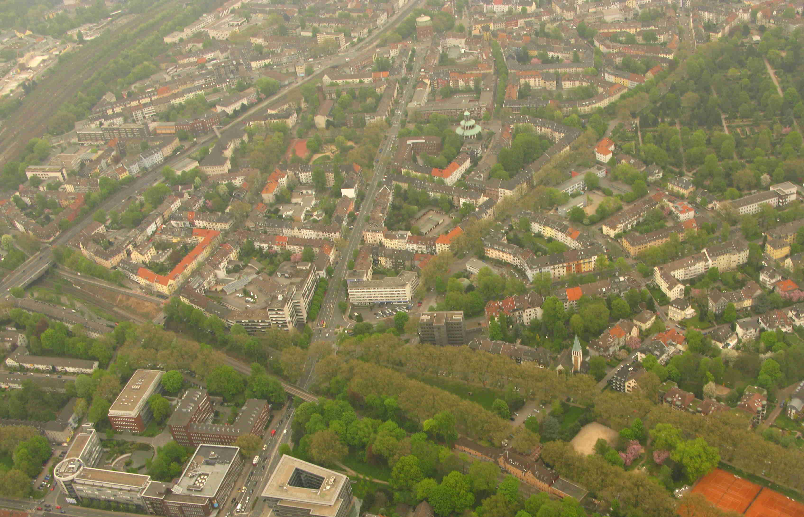 Essen Südostviertel Blick nach Nordost vom Moltkeplatz bis zur Steeler Straße